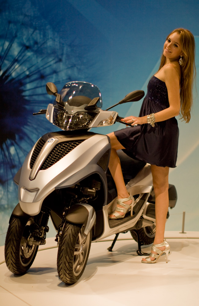 Motonews.ru: Девушка и трехколесный скутер Piaggio на выставке EICMA 2010